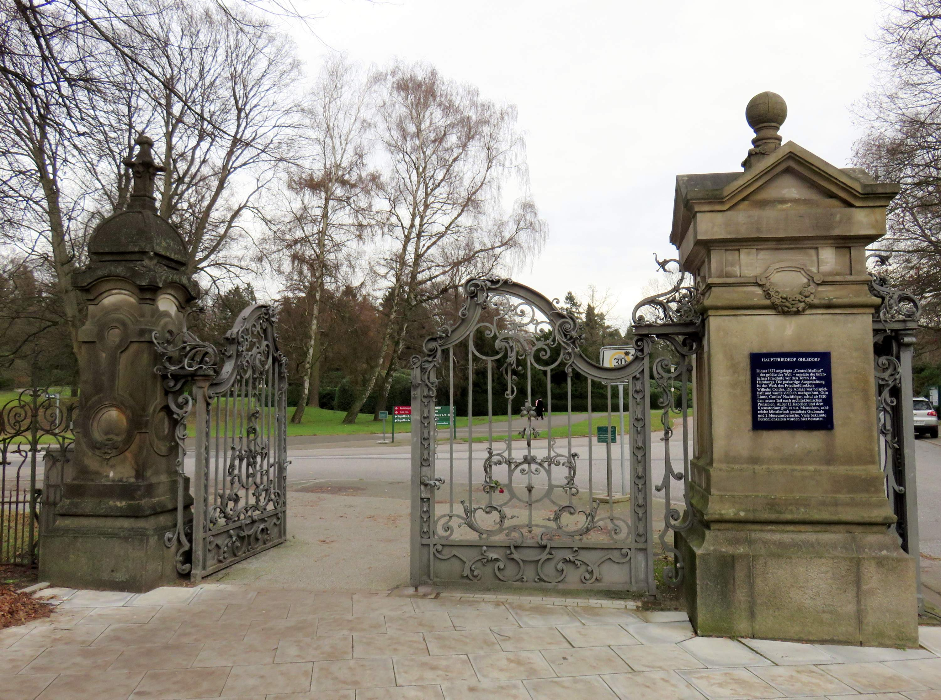 Einfahrt von der Fuhlsbüttler Straße auf den Ohlsdorfer Friedhof mit Infotafel.